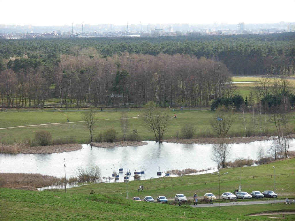 Widok z Góry Myślęcińskiej